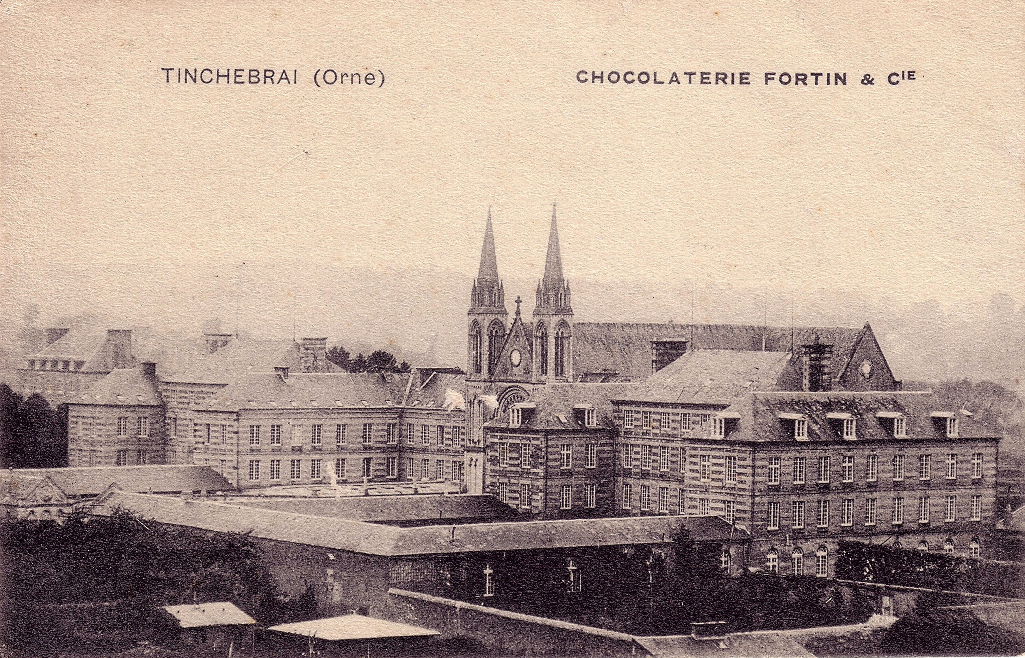 Tinchebray, Orne, Chocolaterie Fortin, Chocolaterie de l'abbaye-Suisse normande, (Carte postale ancienne retouchées)